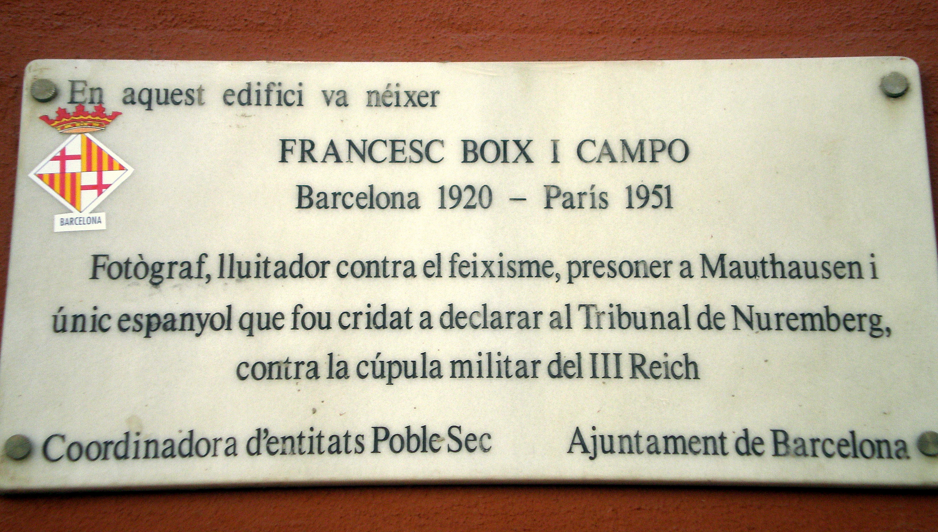 Placa a la casa al carrer Margarit, on va néixer Francesc Boix i Campo. Fotògraf. Francesc Boix i Campo (Barcelona 1920- 1951) Francesc Boix va néixer al barri del Poble Sec a Barcelona el 14 d'agost[1] de 1920. Va combatre en la guerra civil espanyola en el bàndol republicà. Un cop acabada la guerra s'ha d'exiliar, i és capturat pels alemanys i deportat al camp de concentració de Mauthausen. En el camp Boix és destinat al Erkennungsdient (servei de identificació del camp) degut als seus coneixements de fotografia. Amb la col·laboració d'altres presos van aconseguir amagar unes 2.000 fotografies i negatius. Moltes d'aquestes Boix va ser l'únic testimoni espanyol judicis de Nuremberg. Les fotografies de Boix van ser proves gràfiques que es van utilitzar per demostrar els crims del genocidi nazi. Va morir l'any 1951 de tuberculosi.